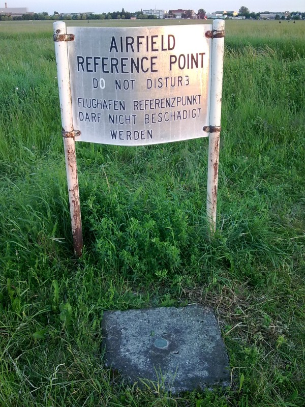 Airport Reference Point, Berlin Tempelhof